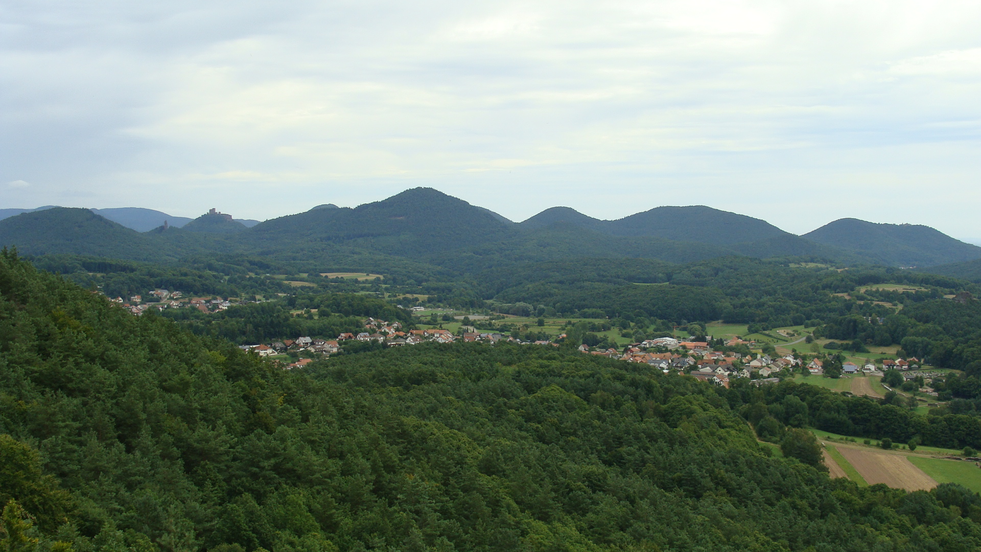 Rehberg und nördlicher Wasgau bei Annweiler - Blick vom Rötzenfelsen am Rötzenberg im Wasgau/Pfälzerwald